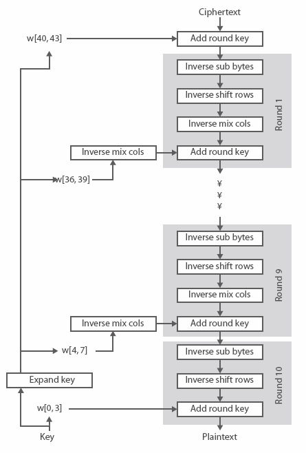 Монгол: AES тайлах